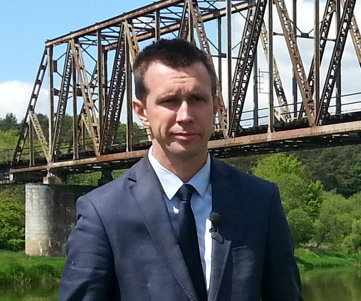 Bartłomiej Pomianowski - prowadzący program "Pociąg do Wielkopolski"